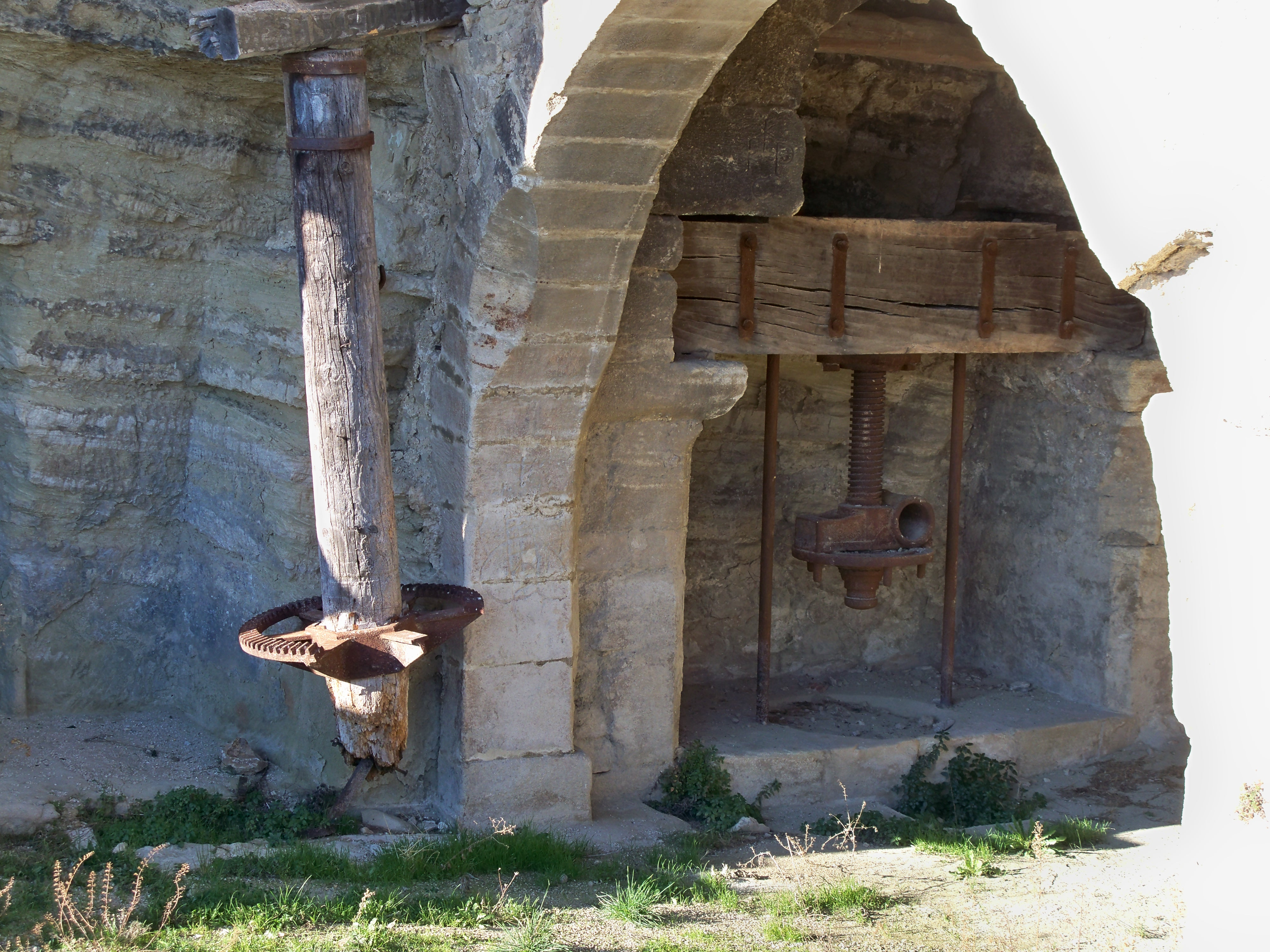 Moulin à huile troglodityque de Saignon (84), France